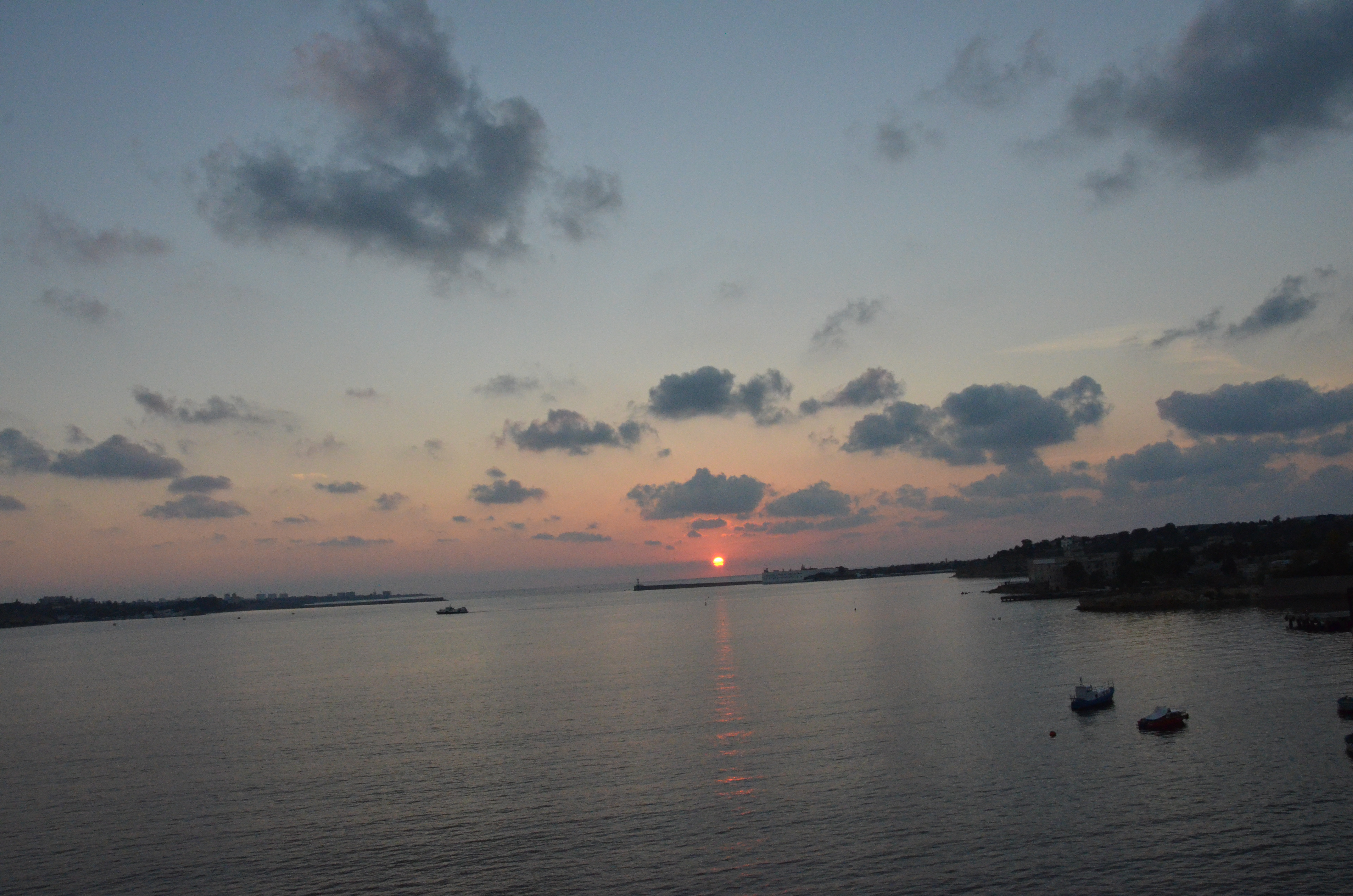 Фото с Северной стороны (Севастополь)